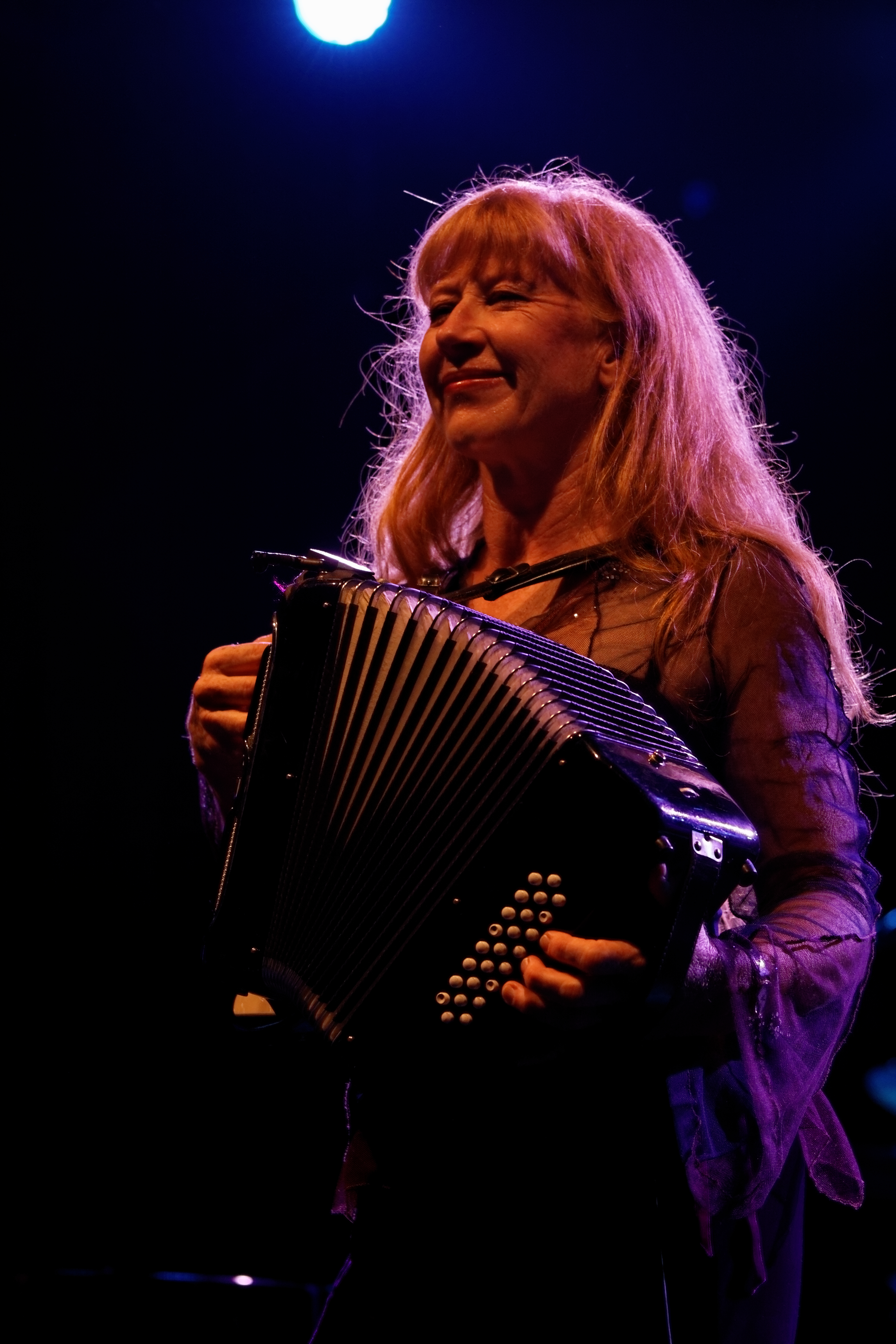 Loreena McKennitt en concert à l'espace Gradlon lors du festival de Cornouaille 2012.